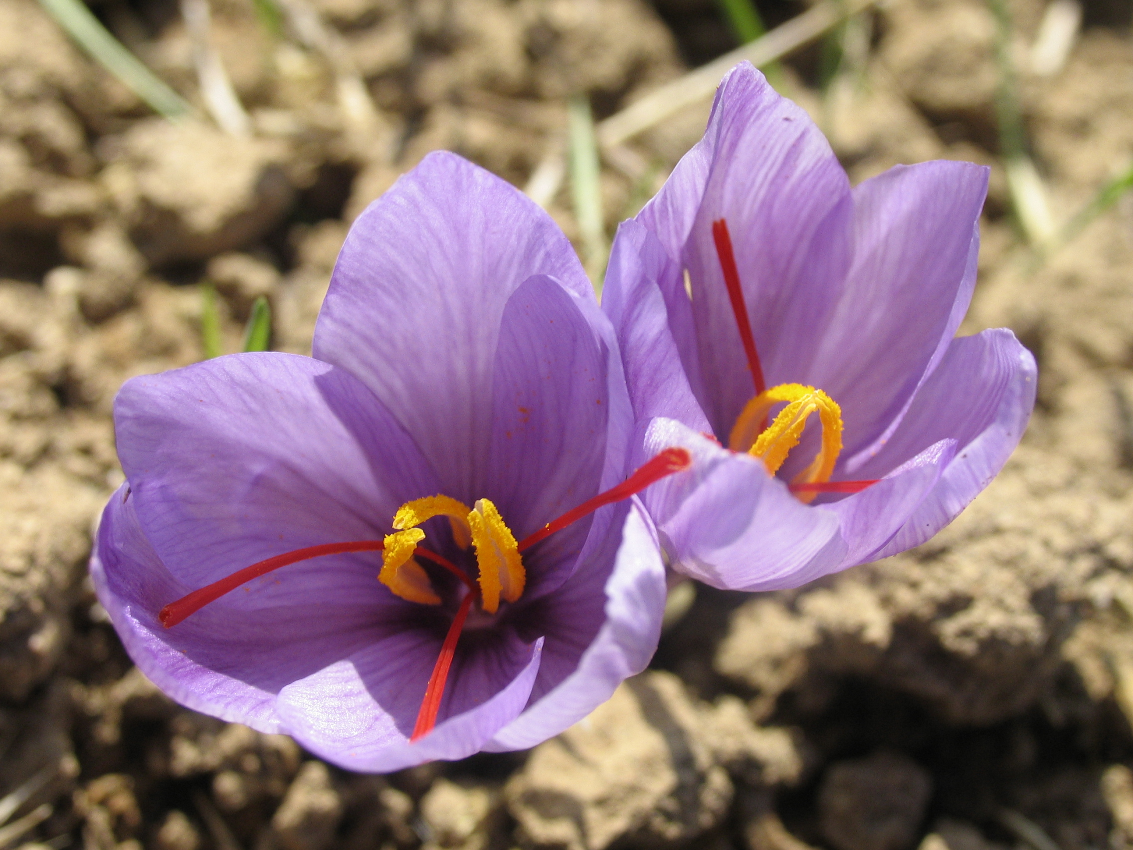 گل زعفران